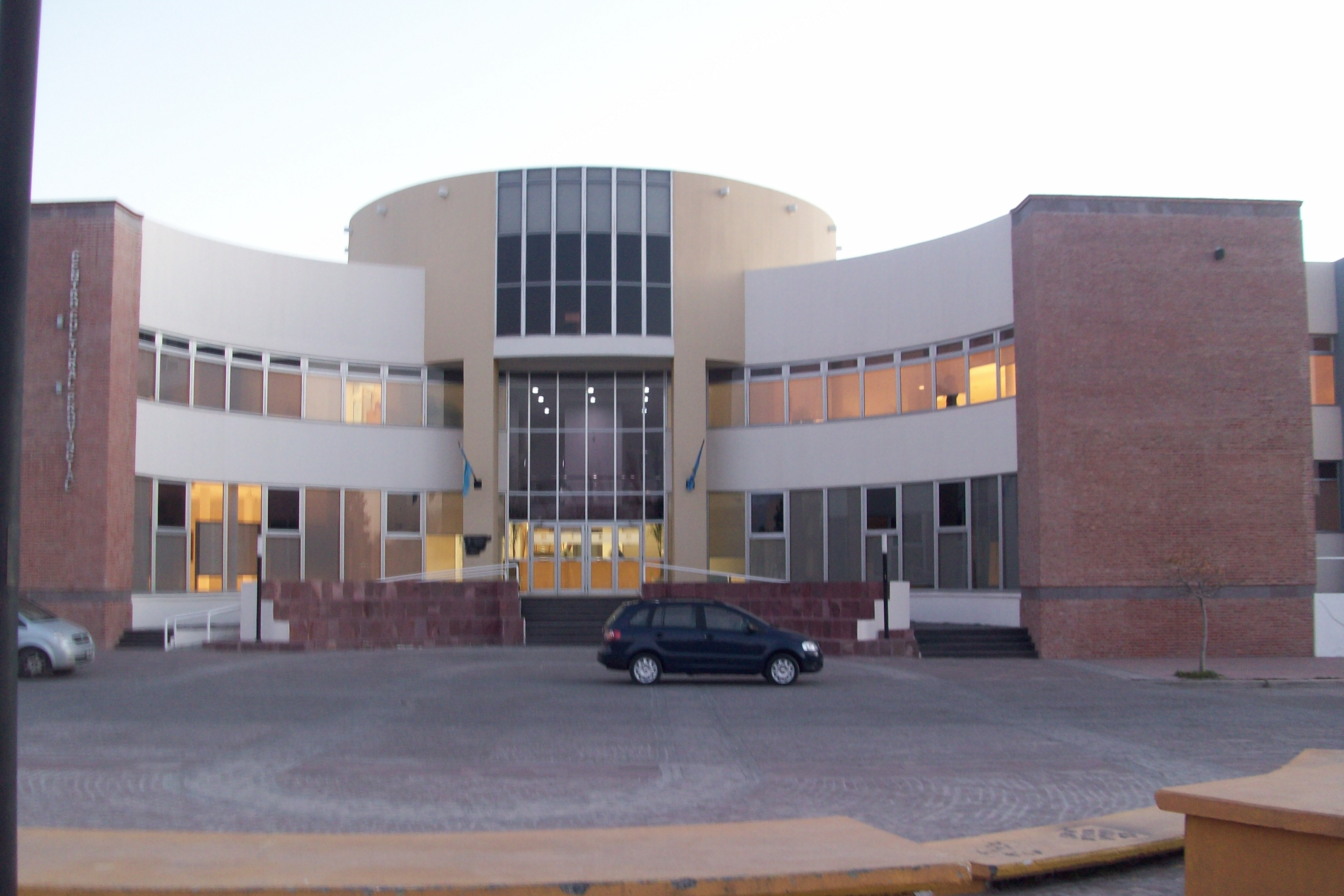 Centro cultural provincial